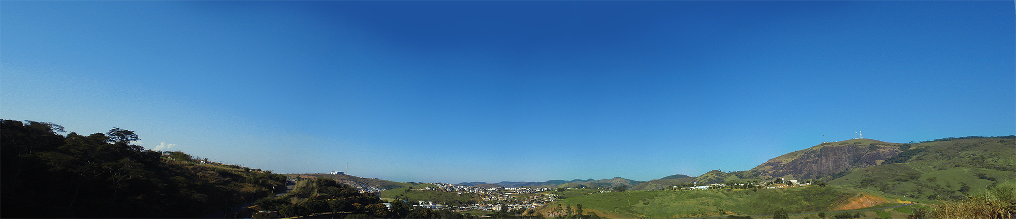 Panorama da cidade Leopoldina, Minas Gerais - Brasil, fotografada no bairro Vale do Sol.